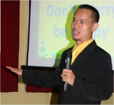 Rofik Hananto saat merintis karirnya sebagai pengusaha